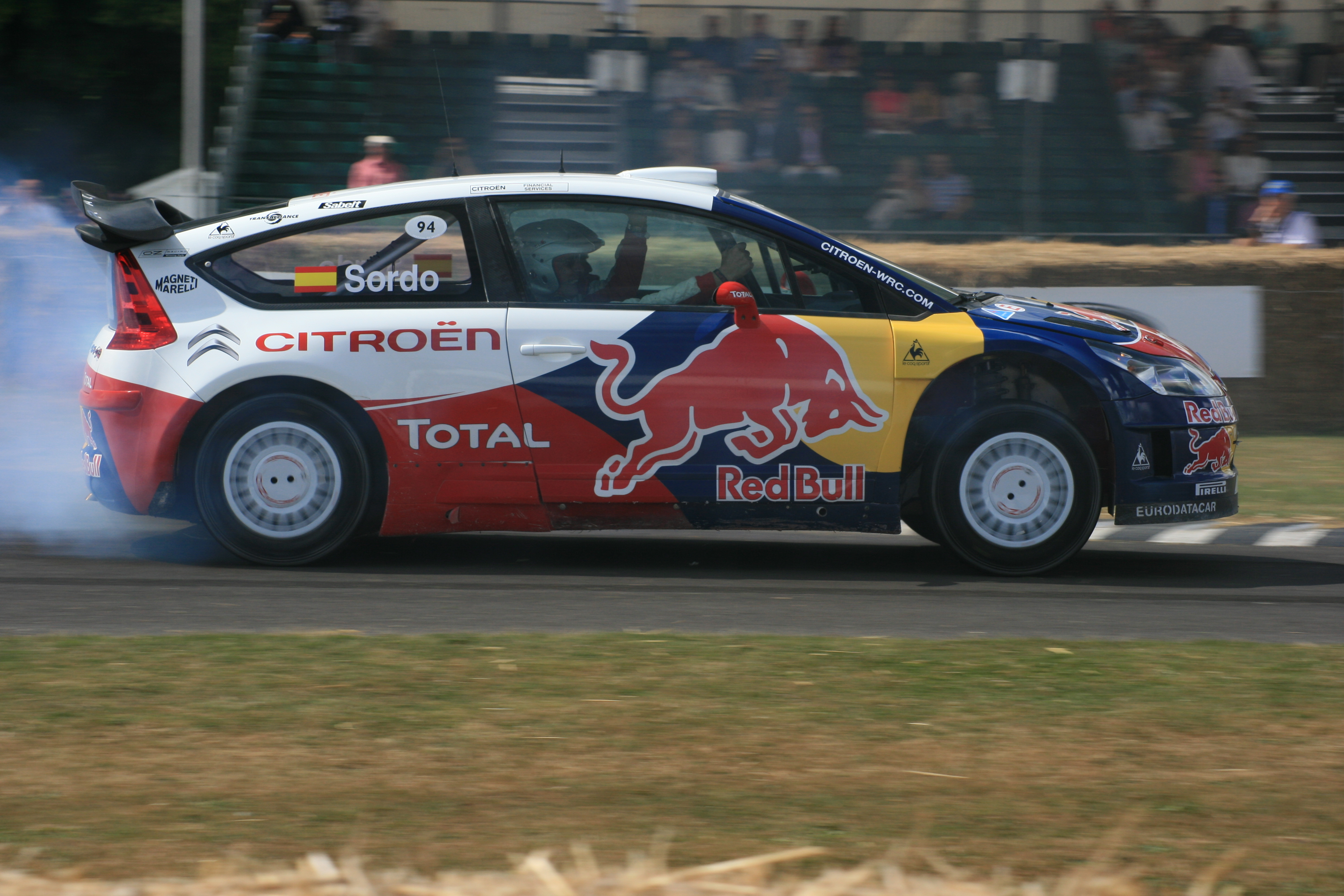 Citroen C4 WRC, 2009